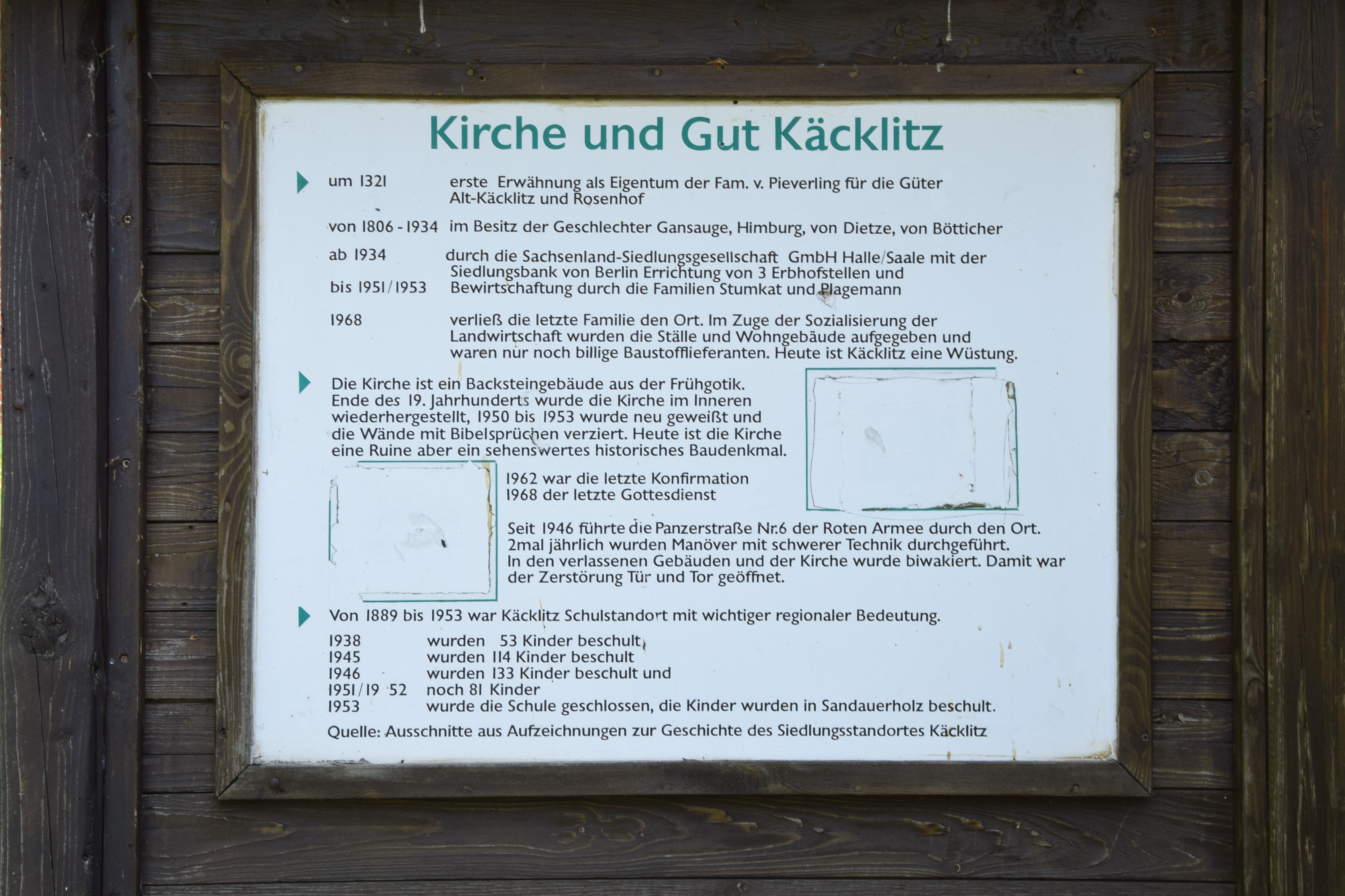 Informationstafel vor der Kirchenruine Käcklitz